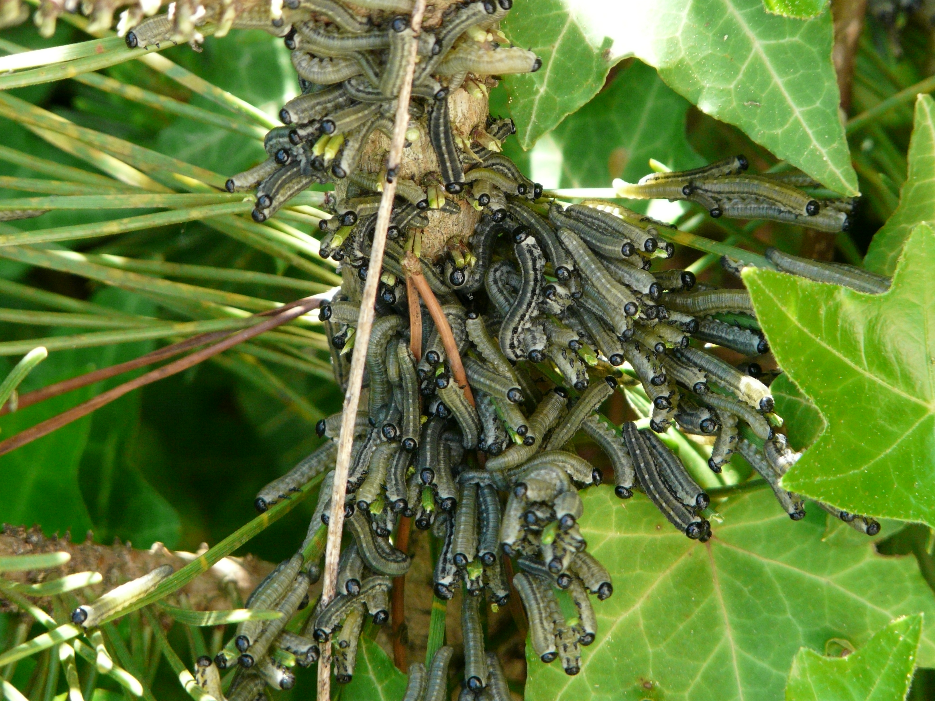 Colonie de chenilles de Neodiprion sertifer sur un pin nain, Périgueux, Dordogne, France